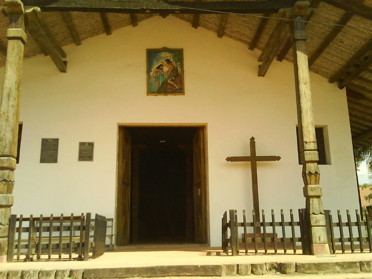 Fachada de la iglesia de Porongo, Bolivia.